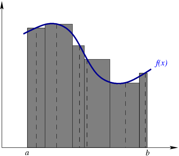 Иллюстрация к определению интеграла Римана